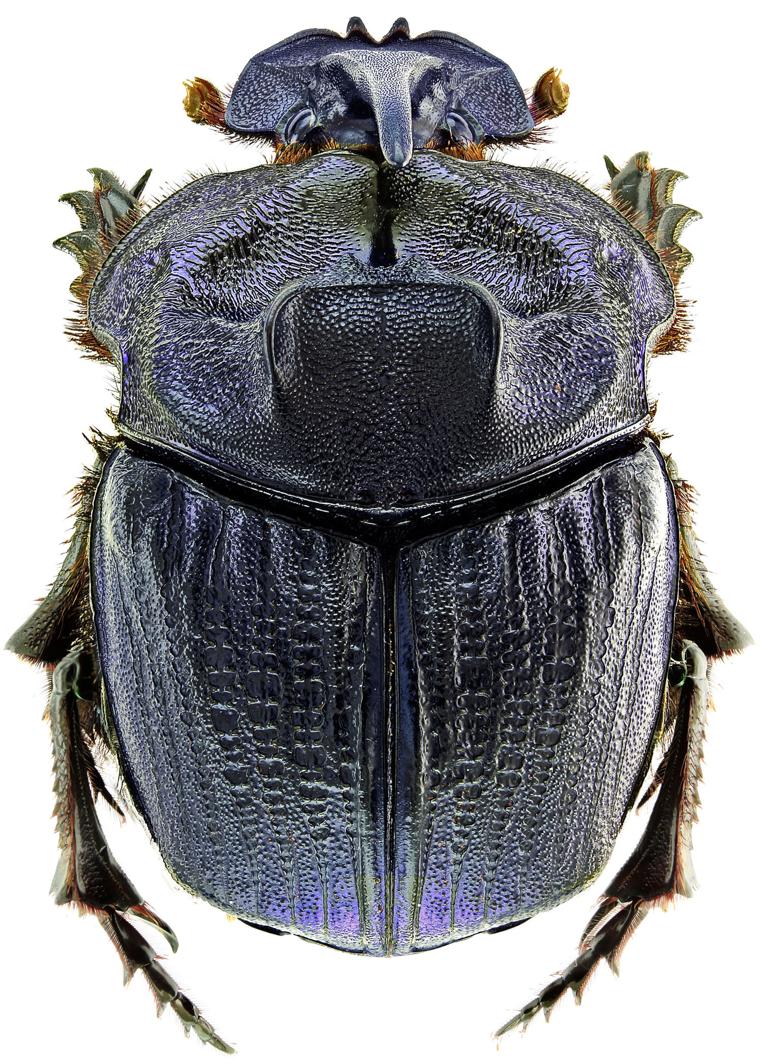 Coprophanaeus lancifer L. habitus en vue dorsale